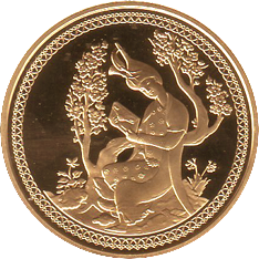 Nizami Gəncəvinin xatirəsinə həsr olunmuş qızıl sikkə